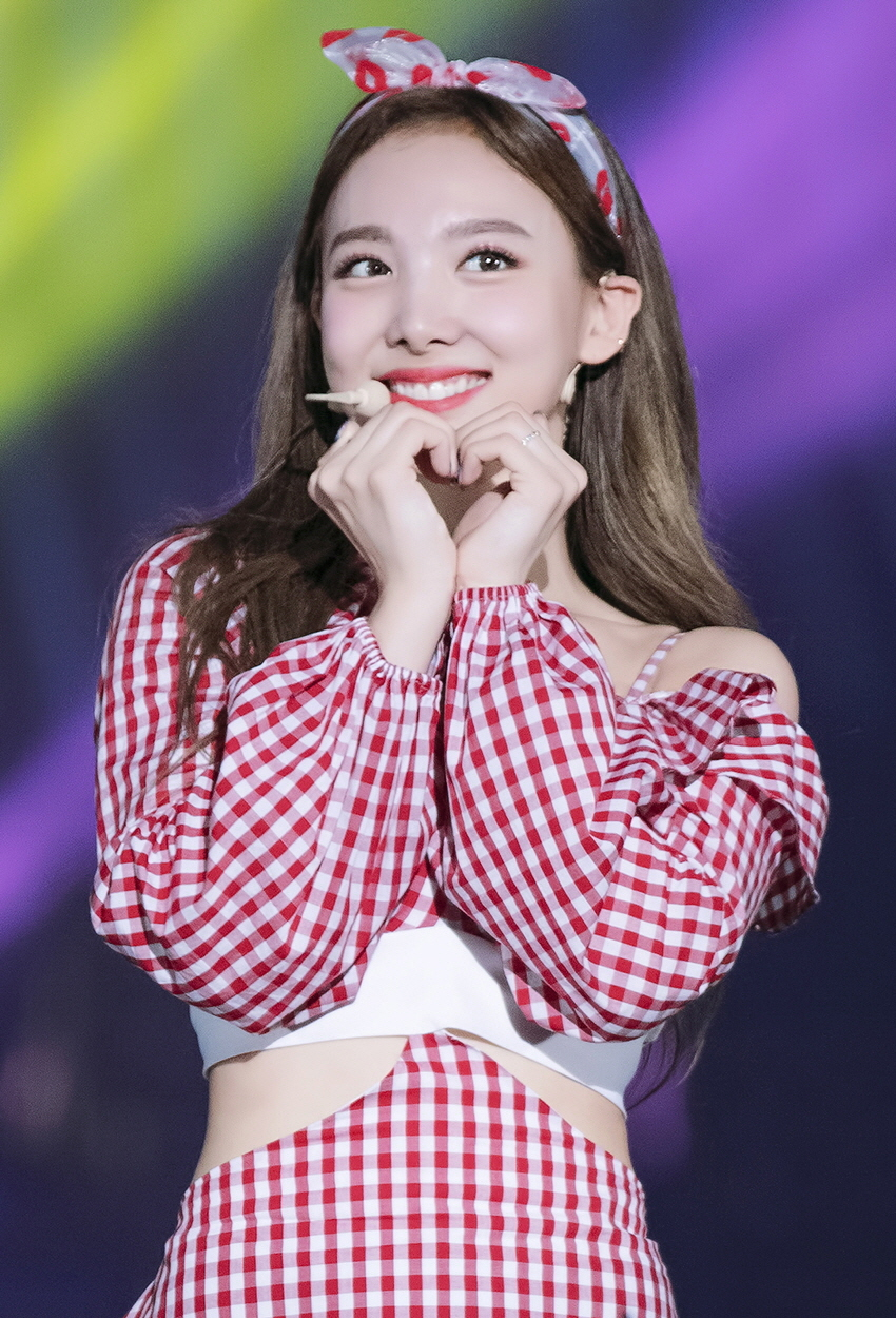 180717 열린음악회 트와이스